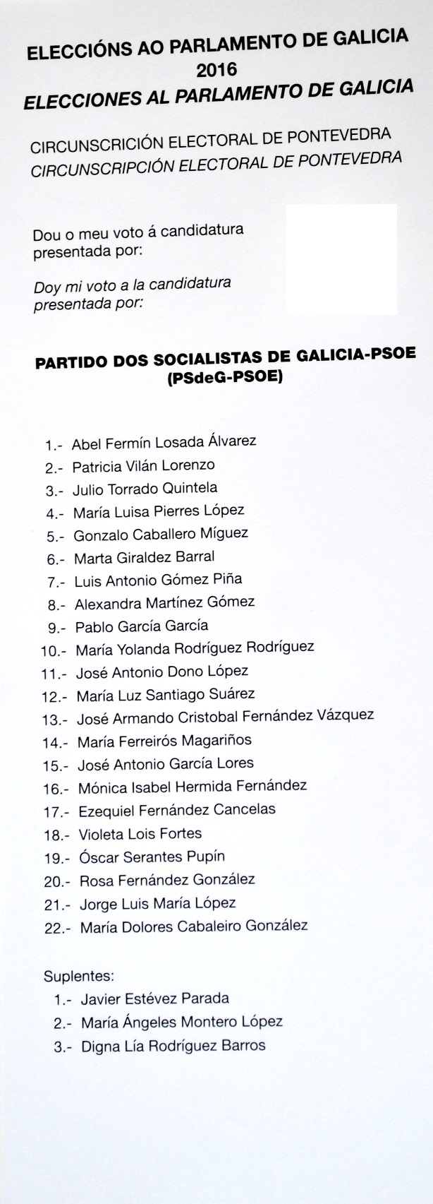 Eleccións ao Parlamento de Galicia 2016. Circunscrición Electoral de Pontevedra